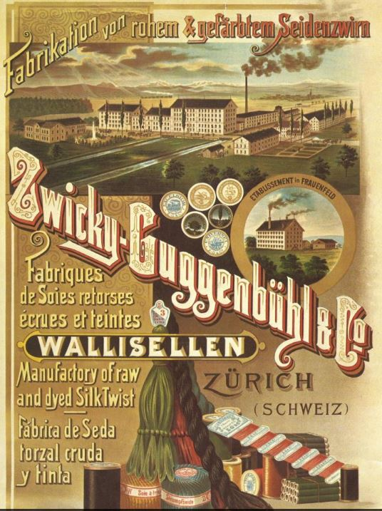 Zwicky-Guggenbühl 1932, Wallisellen ZH, Schweiz